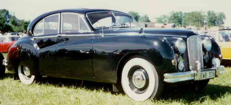 Jaguar Mark VII M Saloon 1955